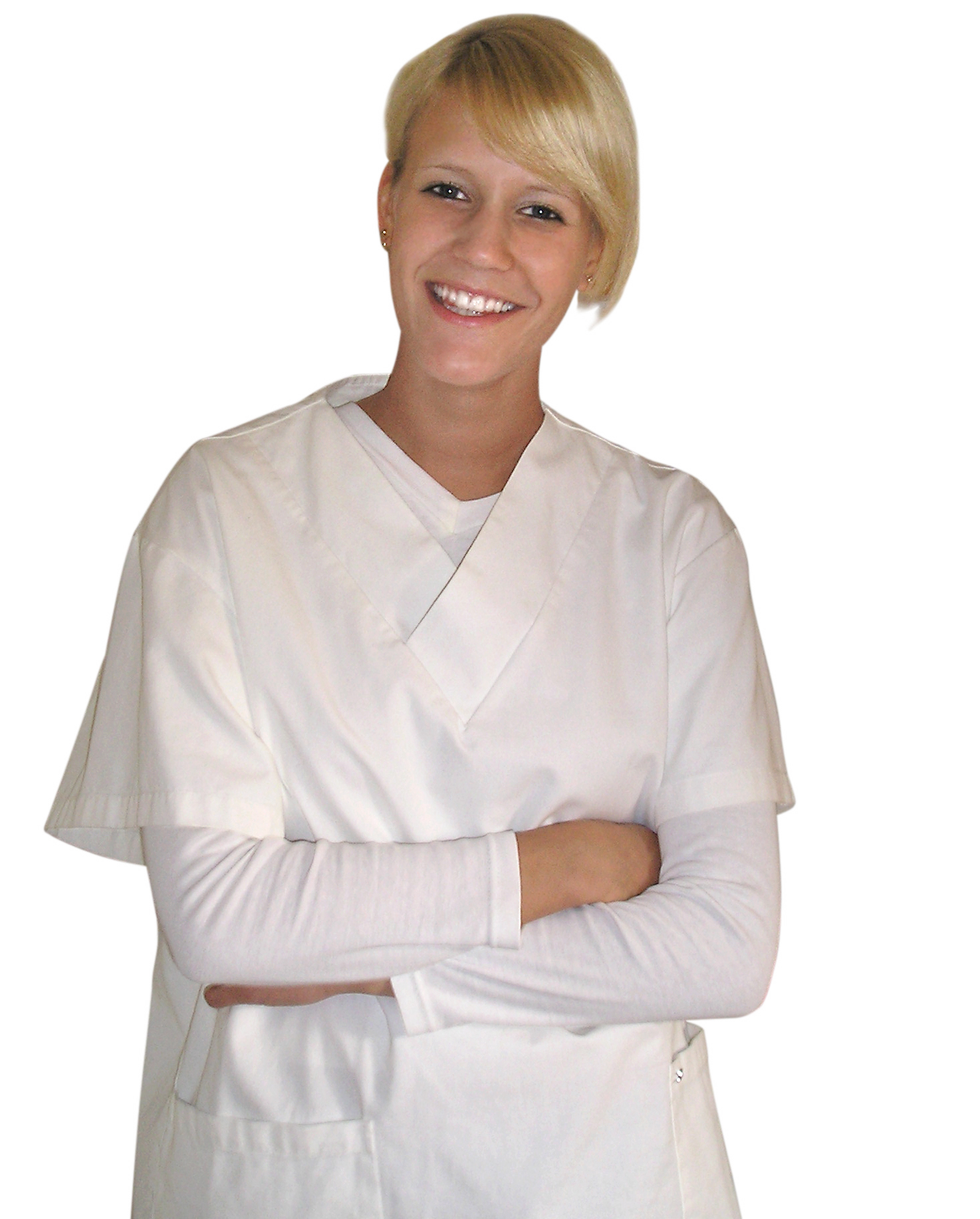 Schwester Janine aus Gelsenkirchen.